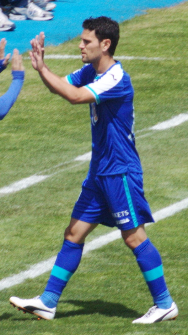 Jaime Gavilán Martínez (Valencia, Comunidad Valenciana, España, 12 de mayo de 1985) es un futbolista español. Juega de interior izquierdo en el Getafe CF. Cambio con el jugador Pedro León